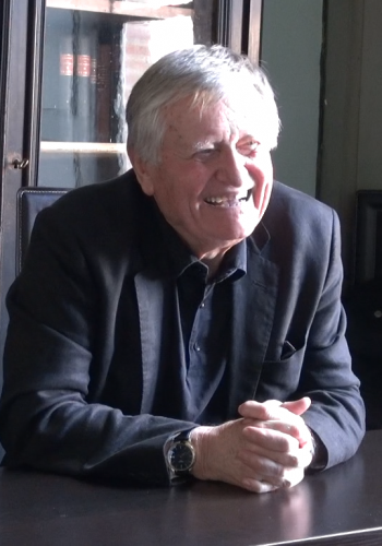 Pierre Laborie, photo prise dans le cadre de l'interview de Pierre Laborie au lycée Saint-Sernin de Toulouse pour le magazine Mondes Sociaux